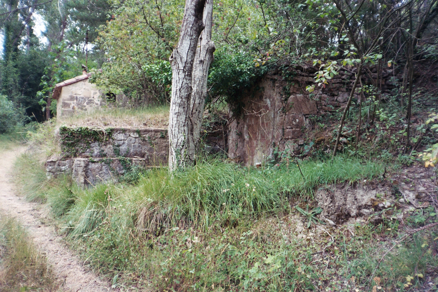 La Font de l'Hort del Bosc (Monistrol de Calders, Moianès)